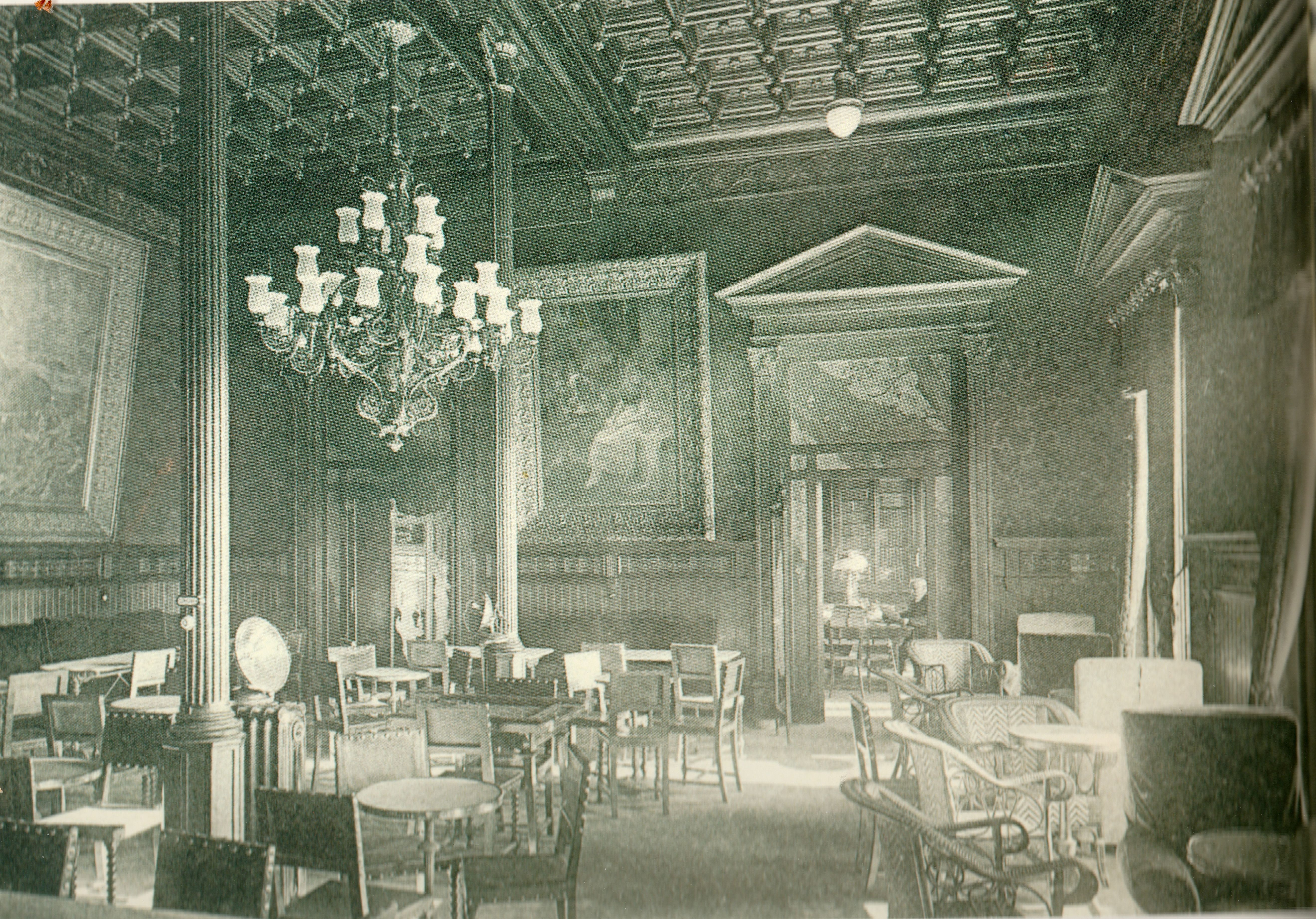 Interior del Círcol el 1909